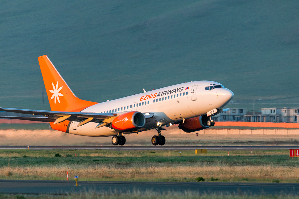 Монгол: EZNIS Airways Boeing 737-700 taking off from Ulaanbaatar. Изинис Эйрвэйз ХХК-ийн Боинг 737-700 агаарын хөлөг Чингис Хаан ОУ-ын нисэх буудлаас Хонконгийн чиглэлд хөөрч байна.